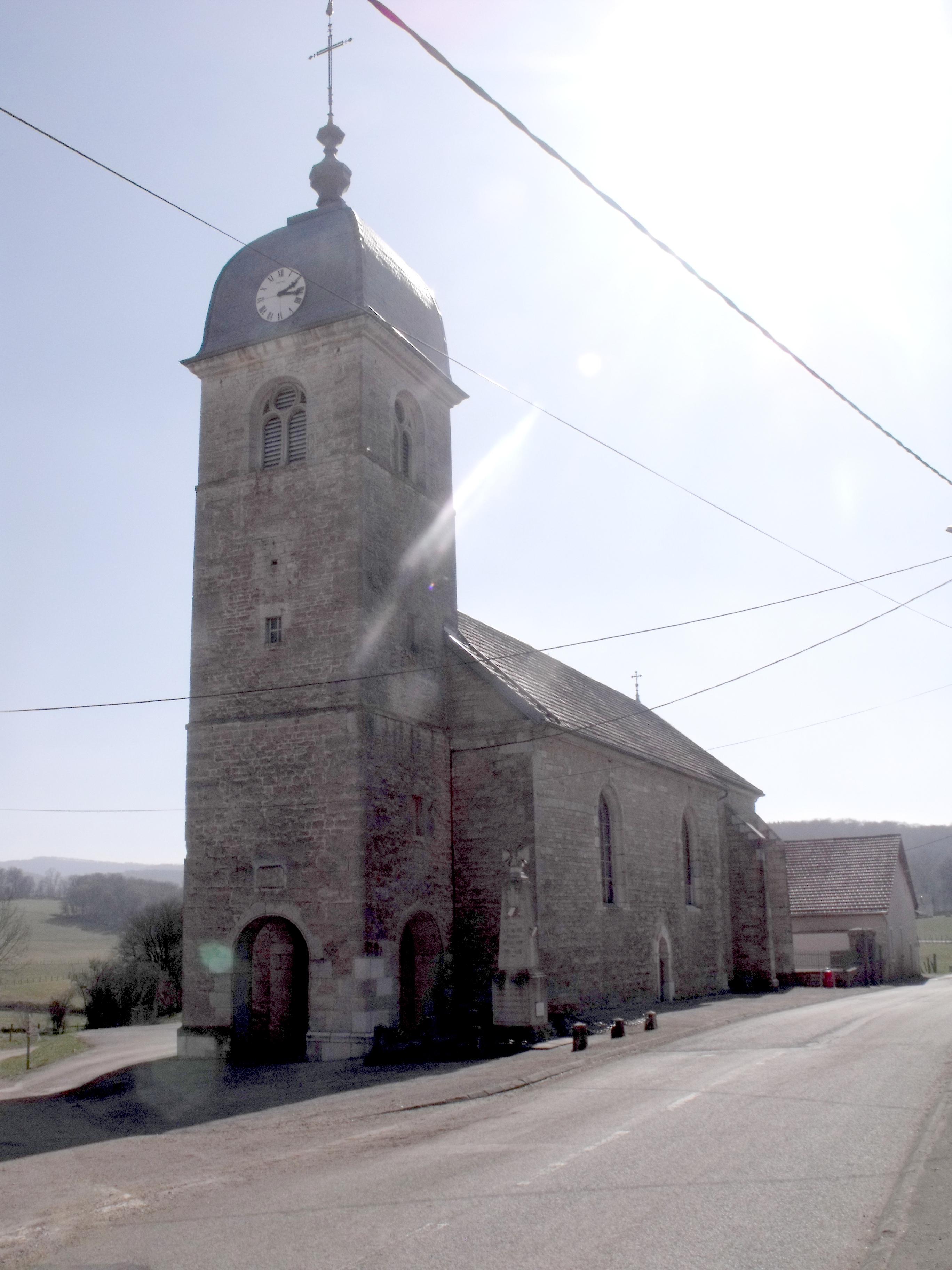 église de Chazot, Doubs, France